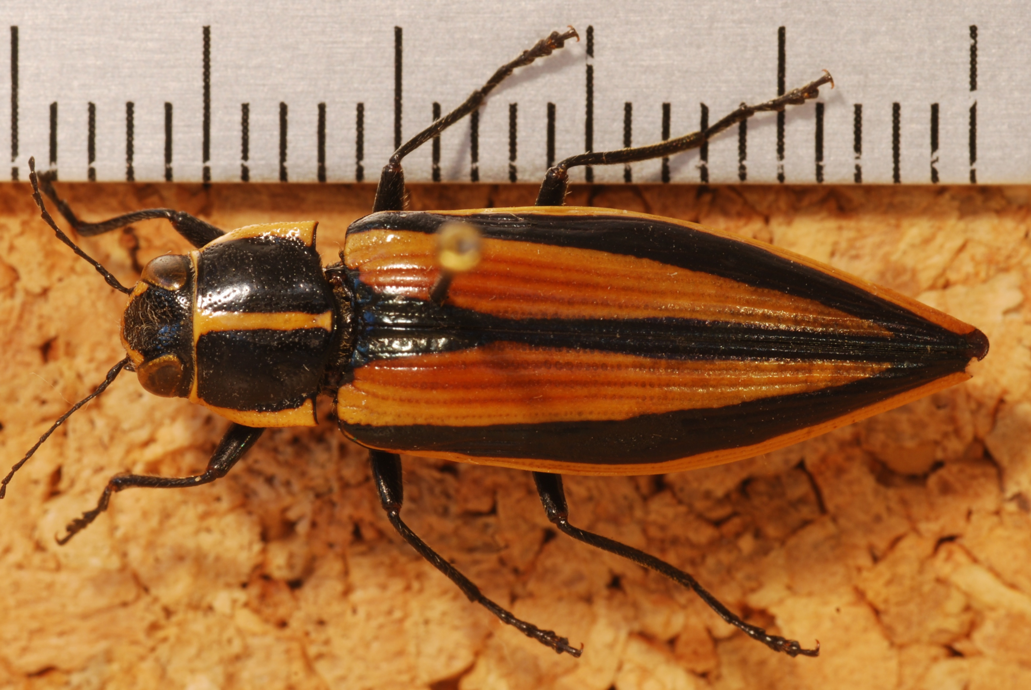 Lonquimay, CHILE